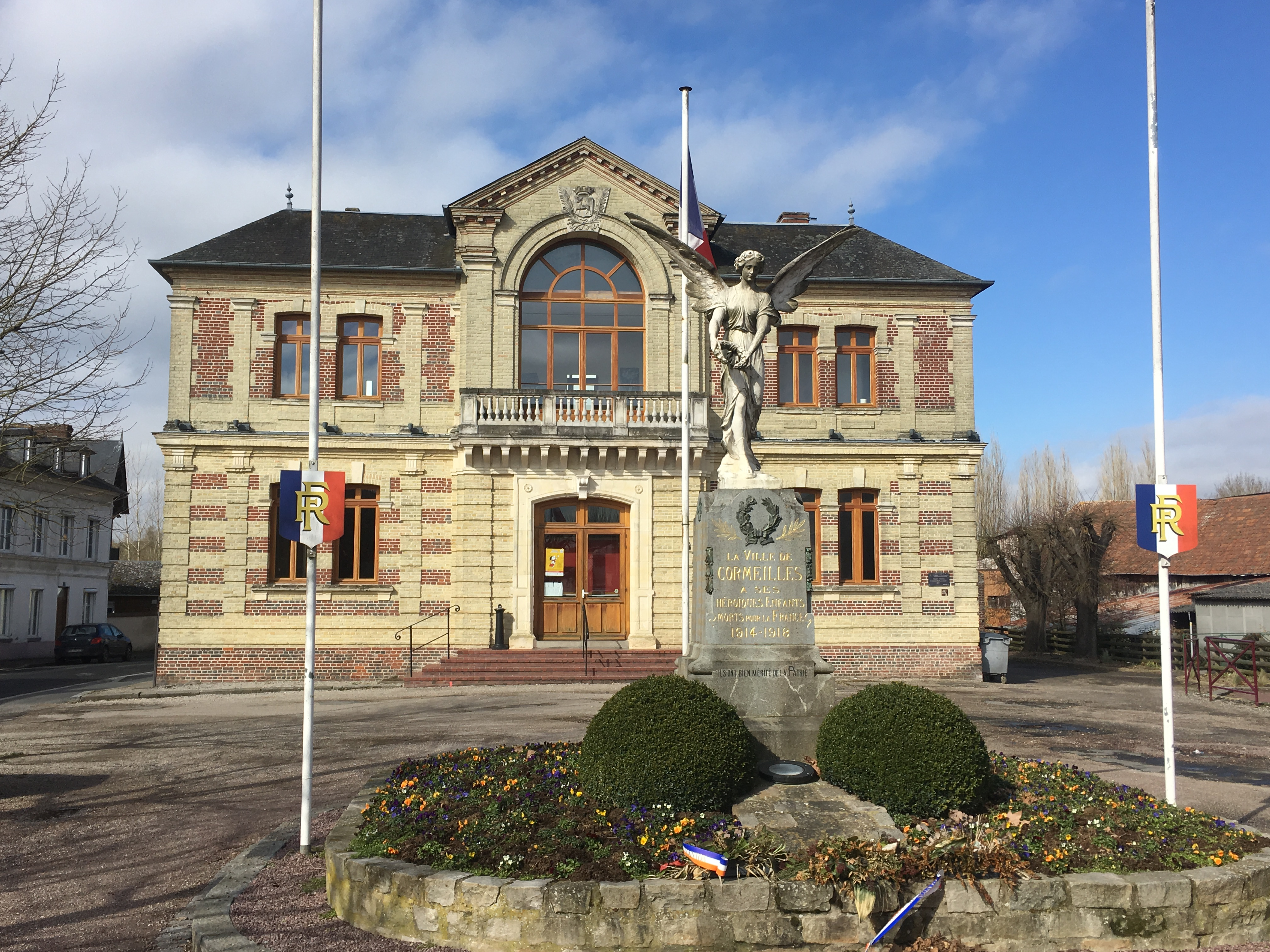 Cormeilles théâtre 27260